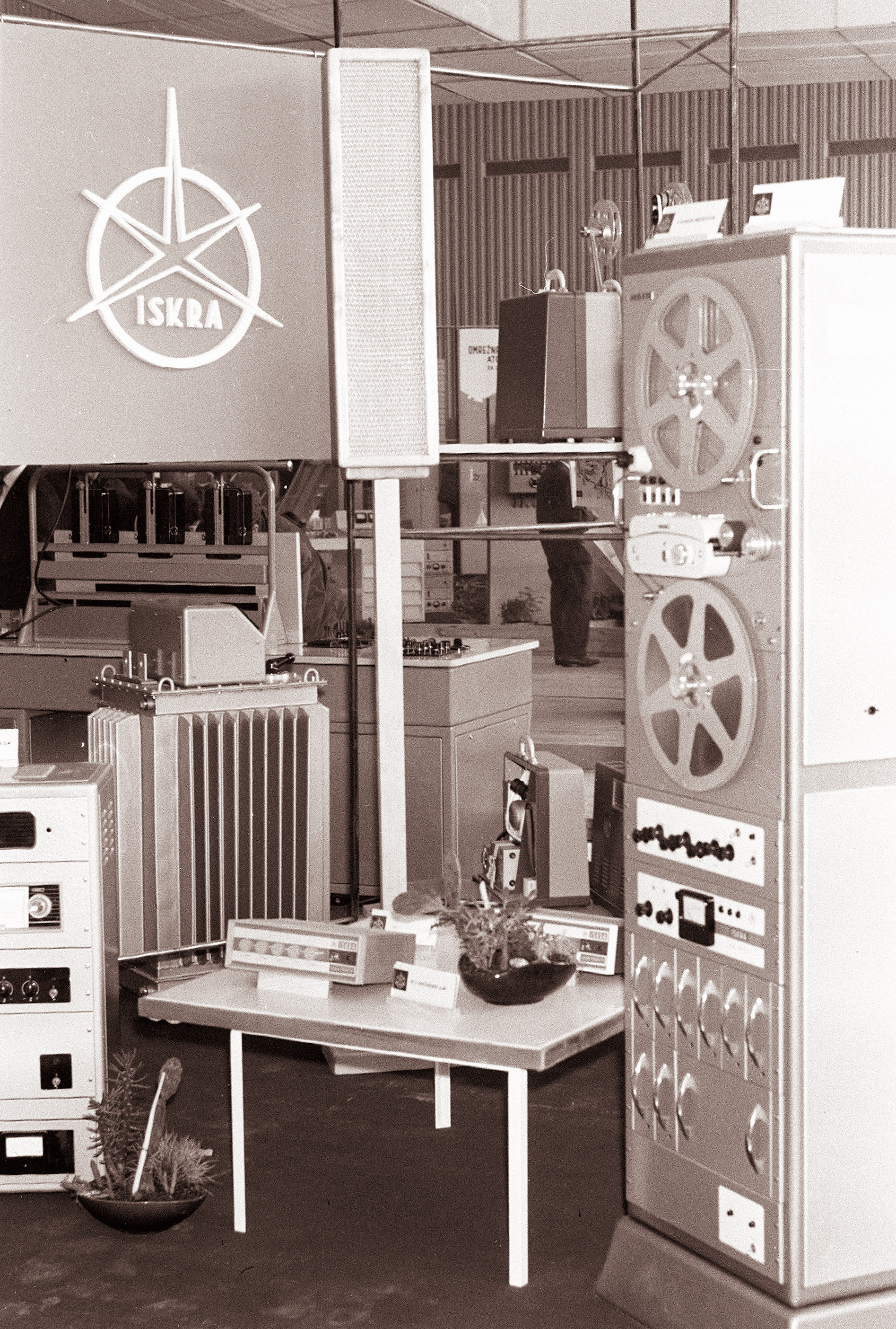 Mednarodni sejem Sodobna elektronika v Ljubljani